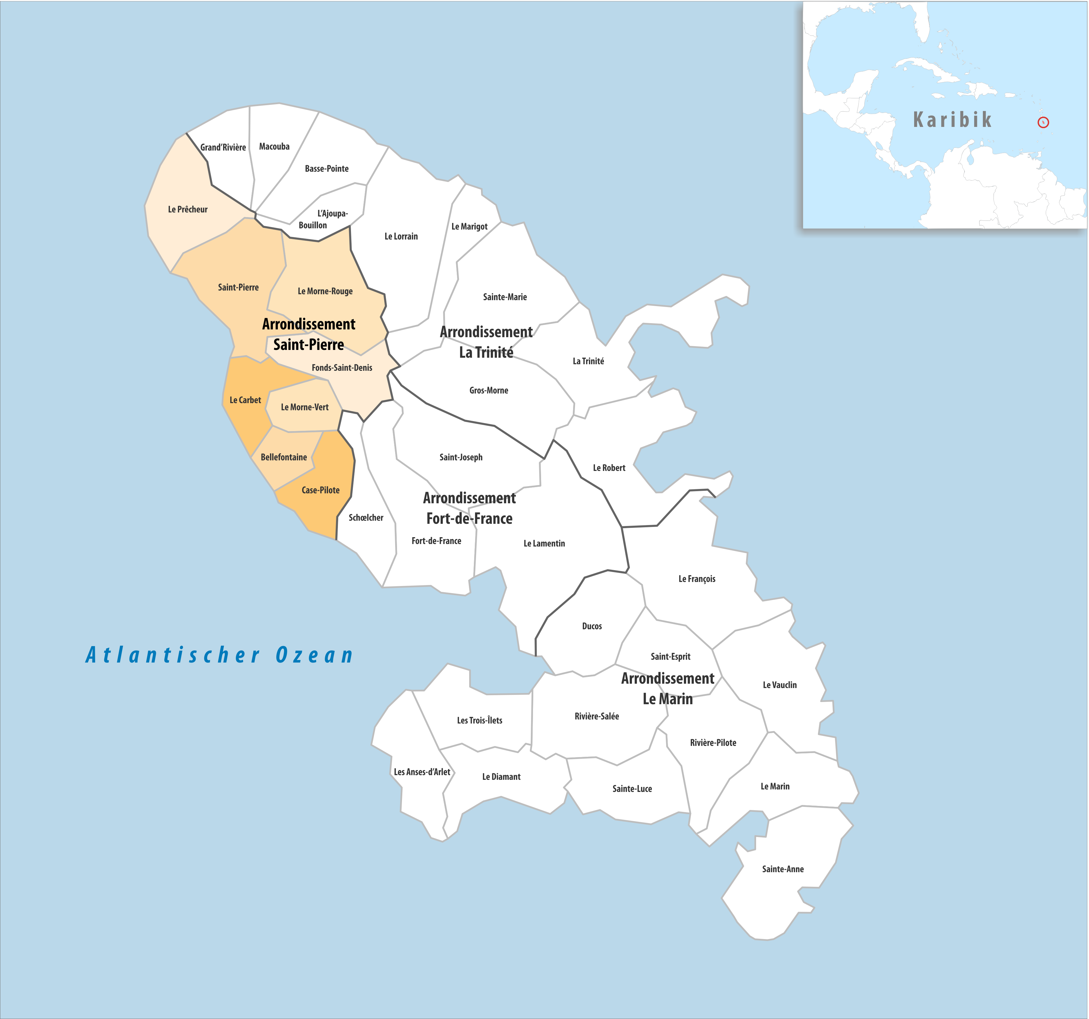 Lage des Arrondissements Saint-Pierre